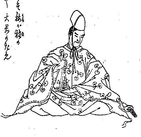 橋本実梁